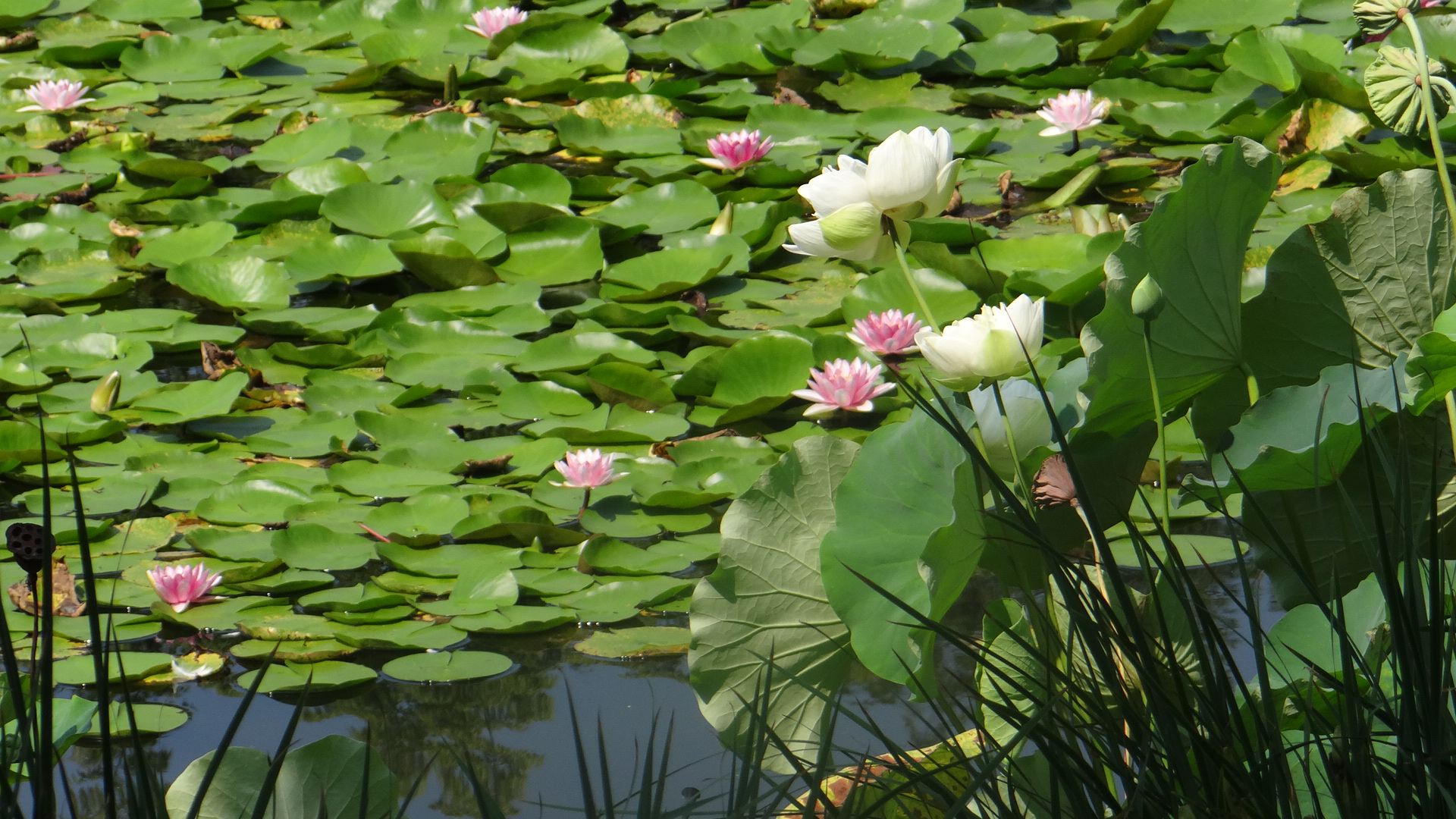 photo prise dans le parc du pavillon d'or à Kyoto